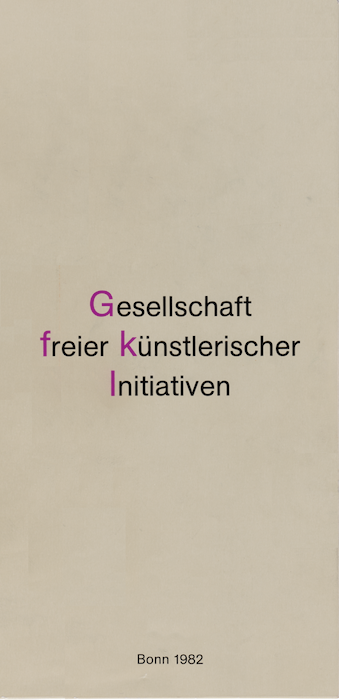 Cover der Satzungsbroschüre der Gesellschaft freier künstlerischer Initiativen (GfkI) von 1982